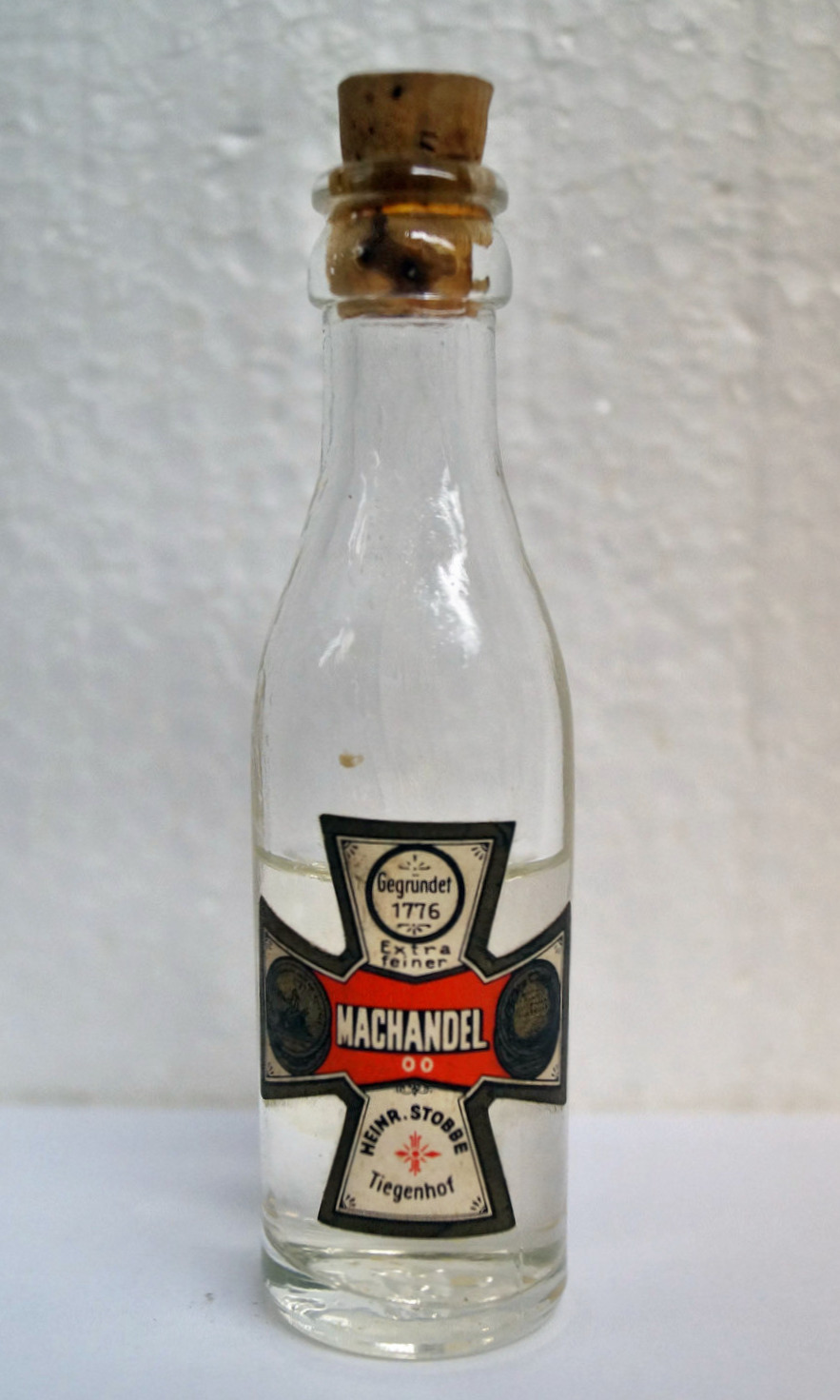 Machandel - Stobbe Tiegenhof - ehemaliges Pommern - (ca. 1930er / 1940er Jahre)